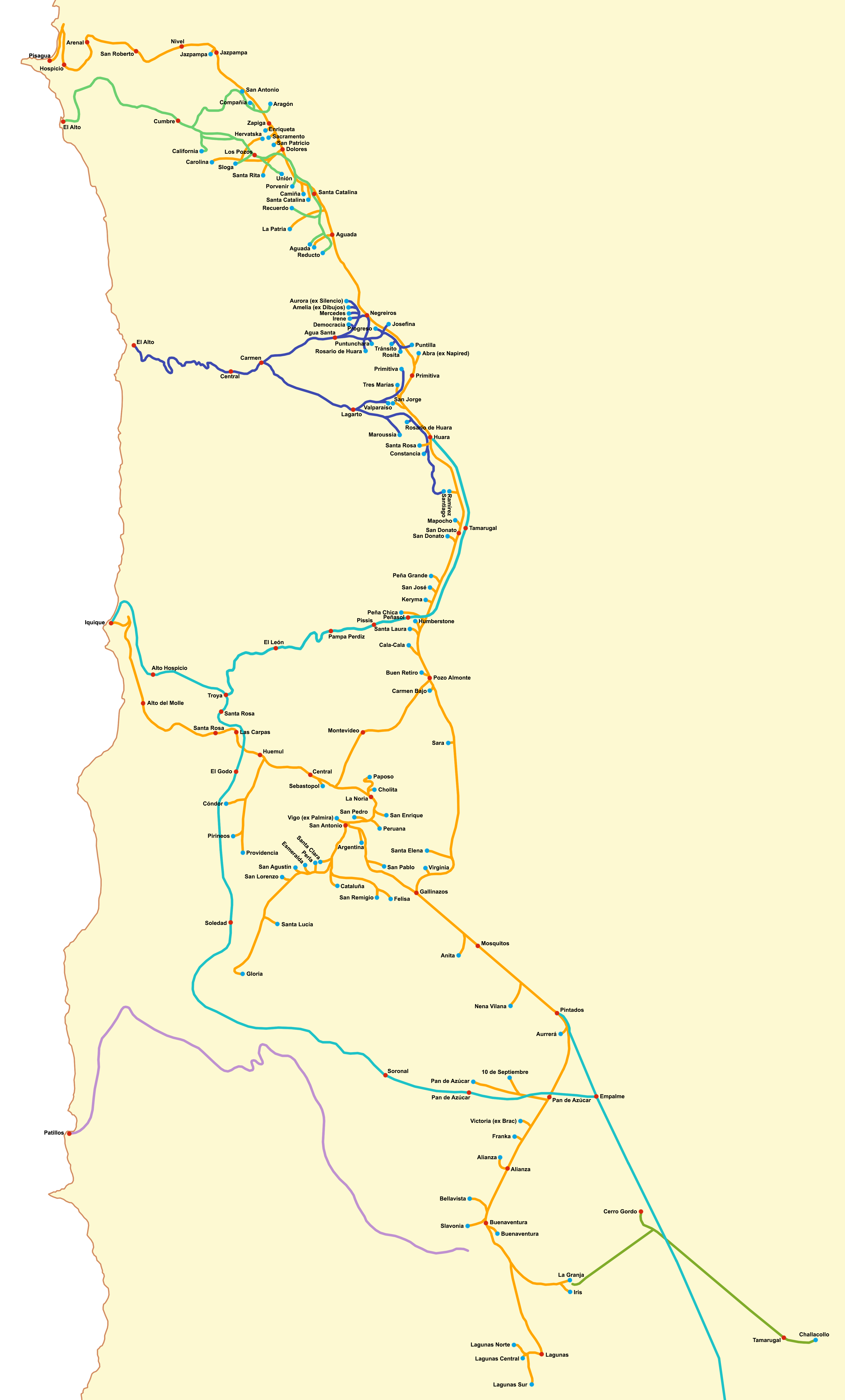 Mapa de las líneas de ferrocarriles de Tarapacá hacia 1930.Naranjo: Ferrocarril Salitrero de TarapacáTurquesa: Longitudinal NorteVerde: Ferrocarril de JunínPúrpura: Ferrocarril de Caleta BuenaVioleta: Ferrocarril de PatillosVerde claro: Ferrocarril de Cerro Gordo a ChallacolloCírculos rojos: estacionesCírculos celestes: oficinas salitreras